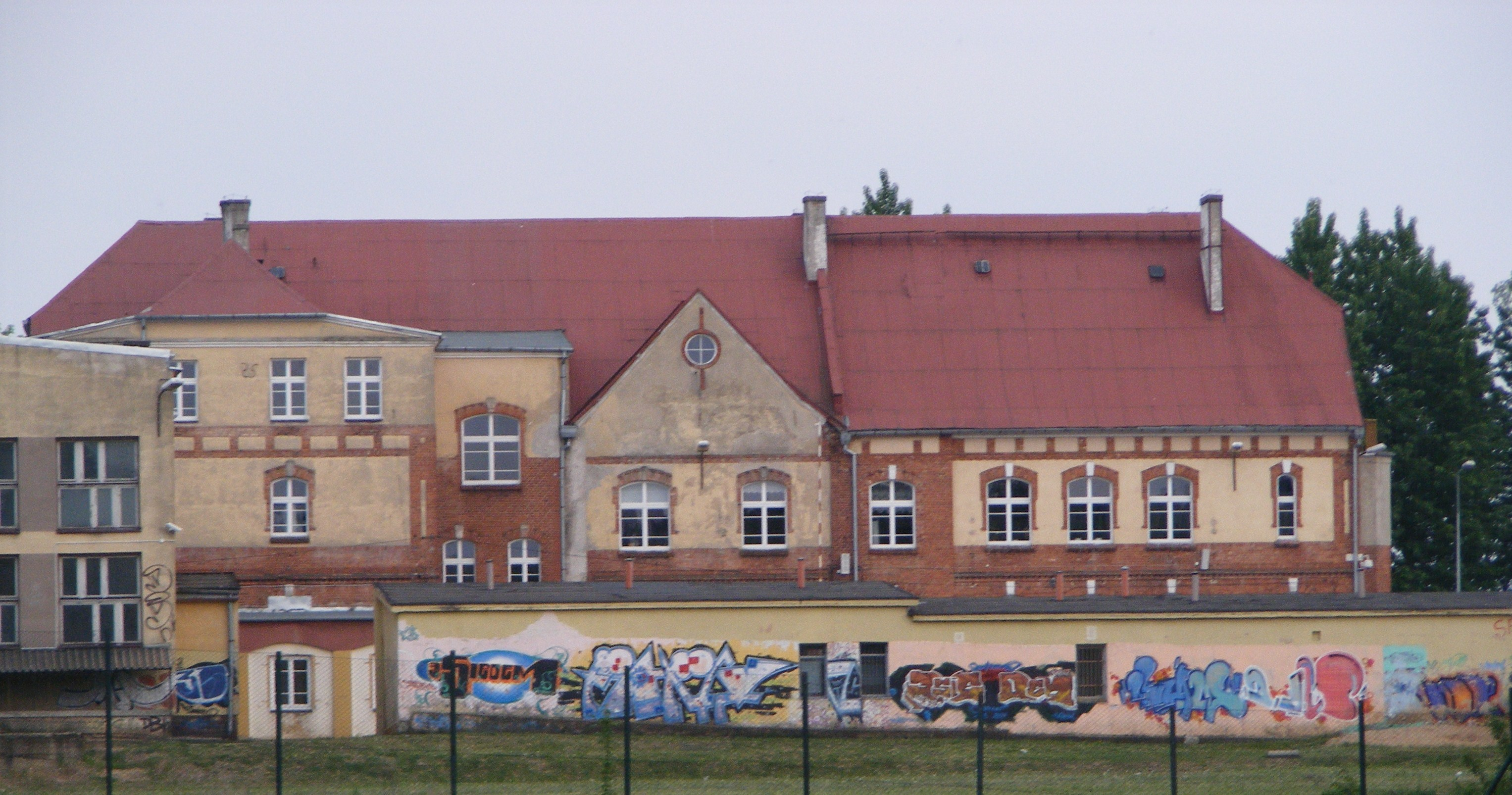 Szkoła.